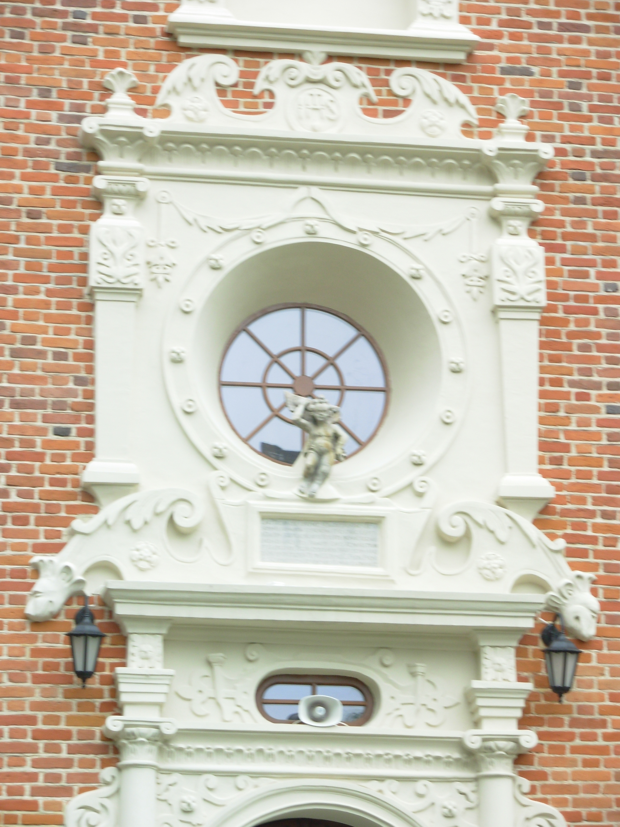 Widoczne jest podobieństwo między okulusem i portalem wejściowym, a oprawą rzeźbiarską okien w kaplicy Górskich i detalem architektonicznym kamienicy Bartosza Celeja w Kazimierzu